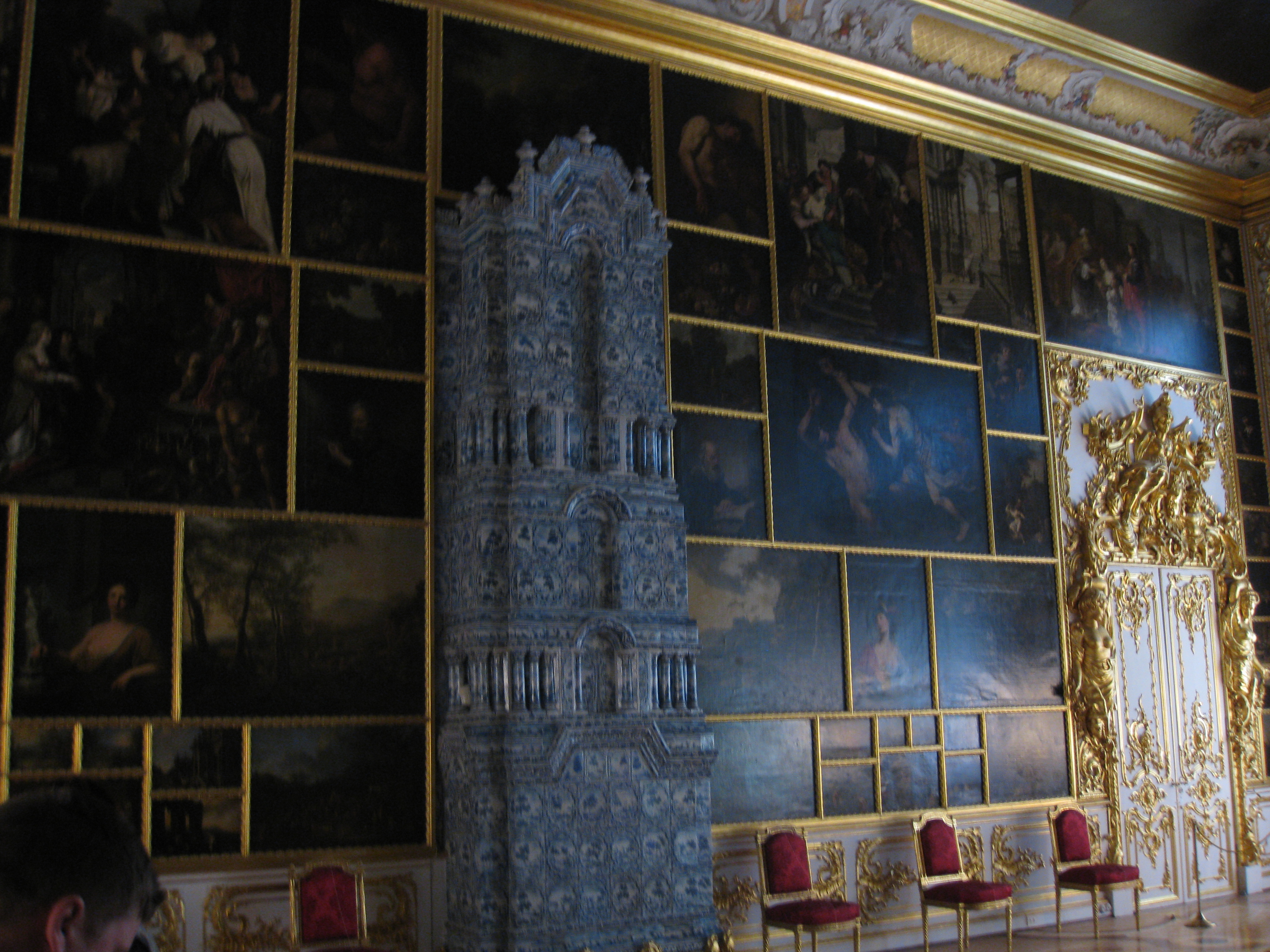 Catherine Palace ארמון יקתרינה הגדולה בפושקין